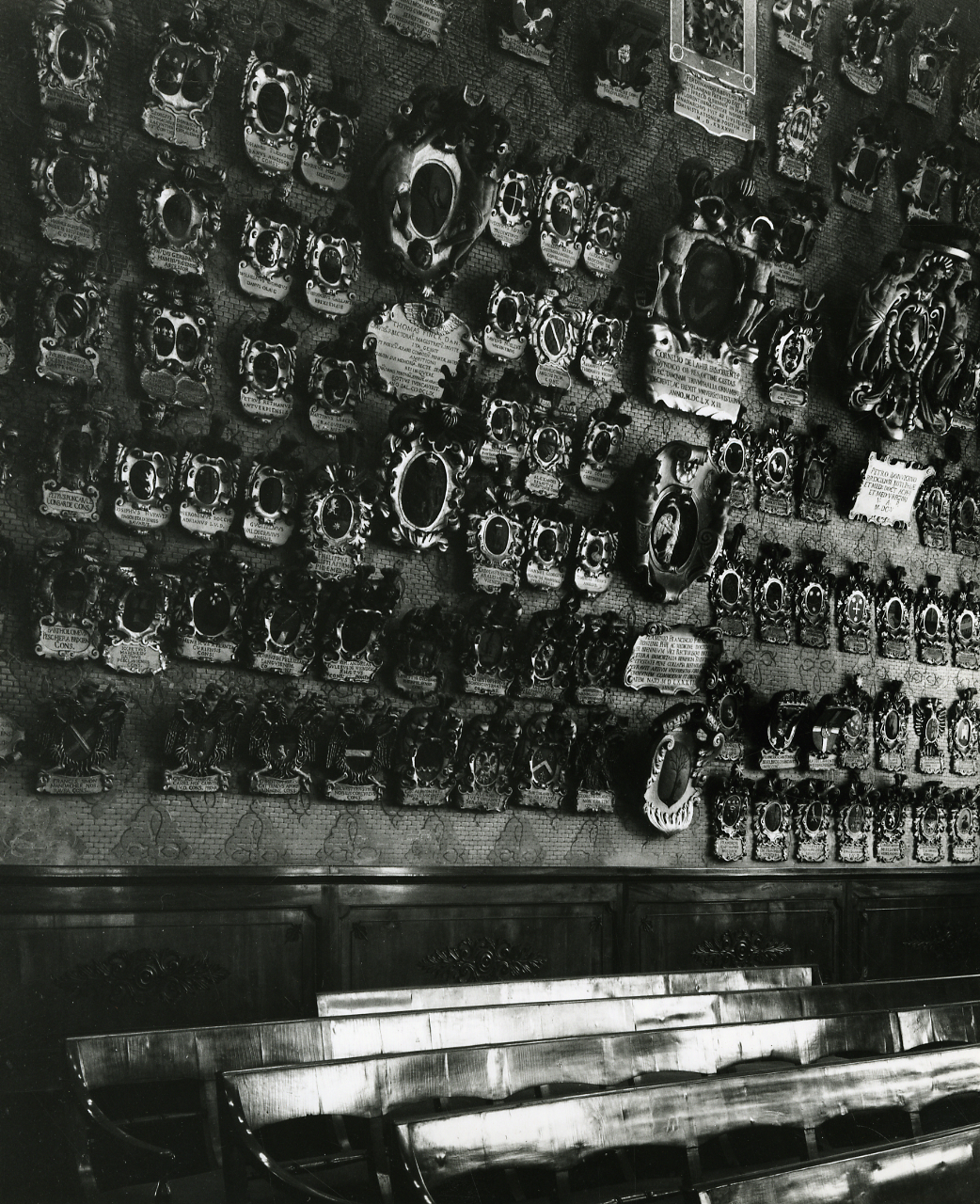 Padova. Palazzo del Bò, Sede dell'Università. Pareti dell'aula Magna decorate con stemmi. Servizio fotografico : Padova, 1966 / Paolo Monti. - Stampe: 2 : Positivo b/n, gelatina bromuro d'argento/ carta, 24x30. - ((Al verso di una delle stampe manoscritto numero di negativo corrispondente: 12621. Sul coperchio della scatola, manoscritto a pennarello: "Emilia-Bologna". - Occasione: Documentazione per la pubblicazione: Emilio CECCHI, Natalino SAPEGNO (a cura di), "Storia della Letteratura Italiana", 9 voll., Milano, Garzanti, 1966 e segg. - Fonte: Monografia di Cecchi Emilio, Sapegno Natalino (a cura di): Storia della Letteratura Italiana, 9 voll., Milano, Garzanti (1966 e segg.). - Fonte: Agenda di Paolo Monti: Monti/ 3 aprile 1966 - 9 marzo 1971/ 12421-16823 (1966-1971), presso Archivio Paolo Monti